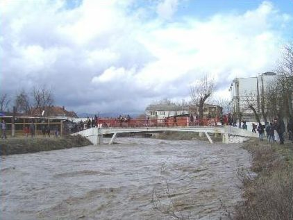 Der Fluss Lab in Podujevo